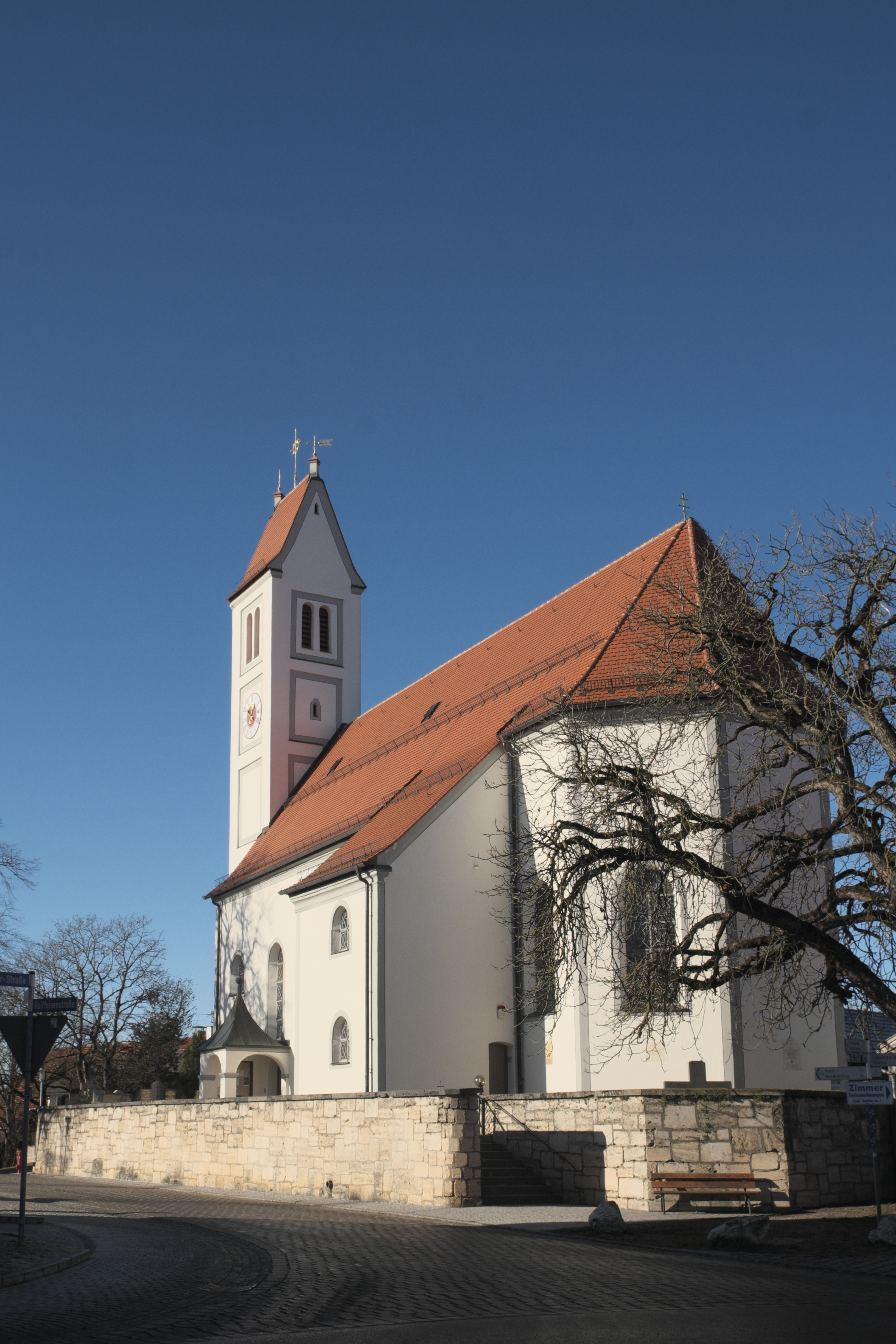 Katholische Pfarrkirche St. Johannes der Täufer in Stadl (Vilgertshofen) im oberbayerischen Landkreis Landsberg am Lech (Bayern/Deutschland)